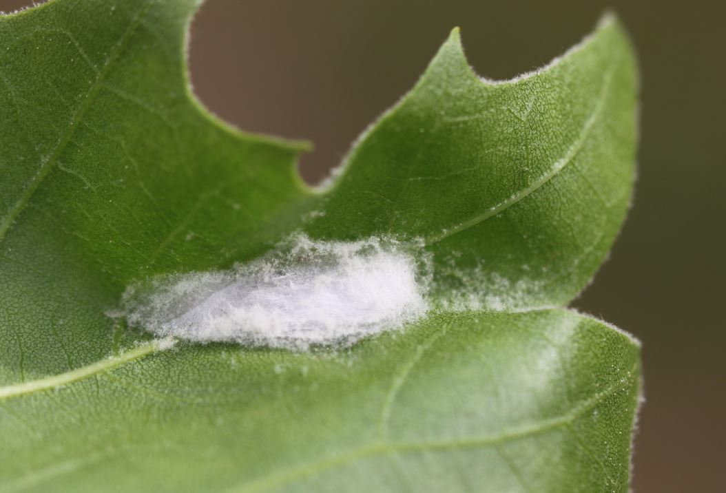 Gespinst an der Unterseite eines Platanenblattes mit einer darin enthaltenen Puppe von Ptycholoma lecheana, am 12. Mai 2020